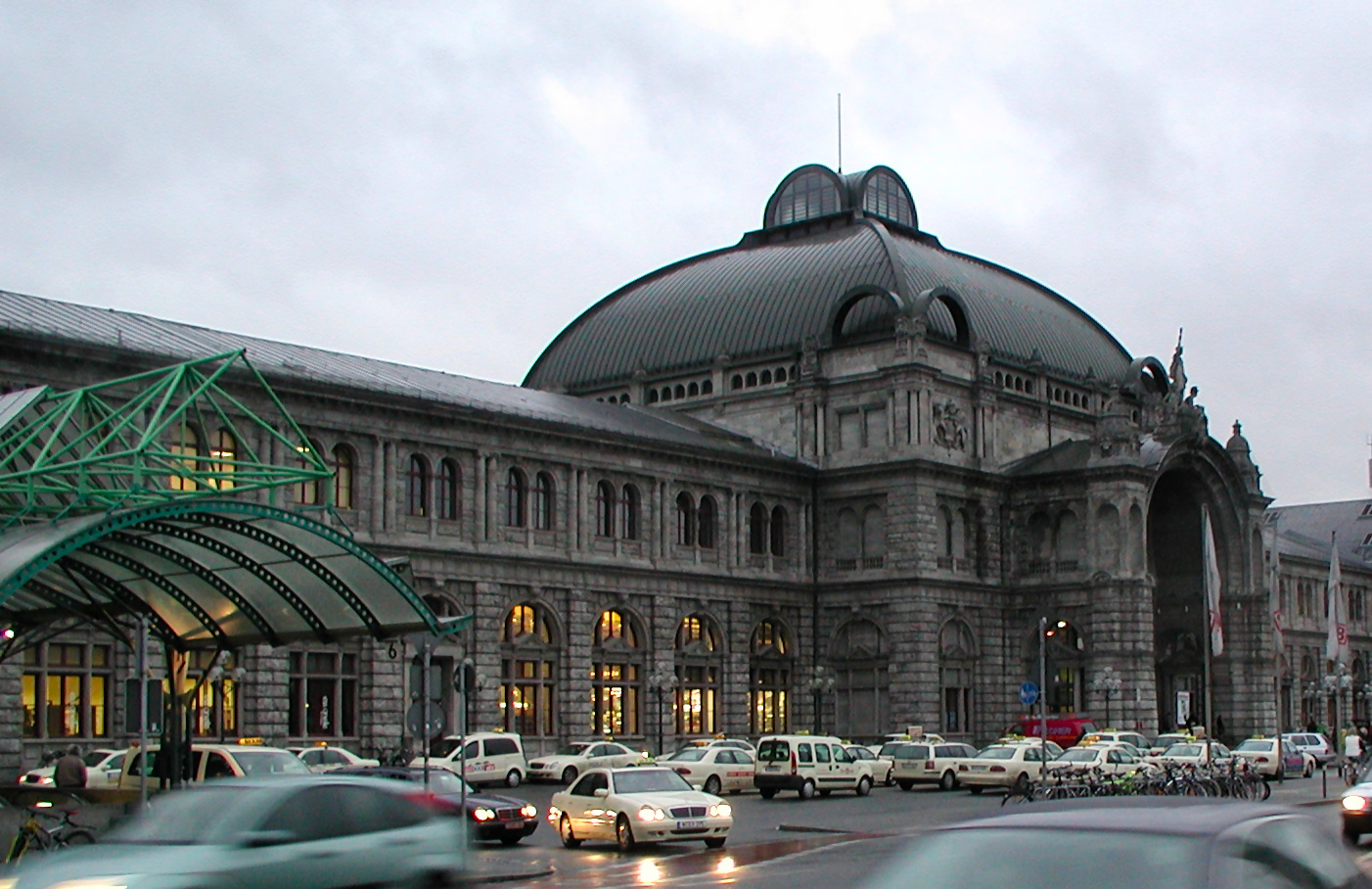 Nürnberg Hauptbahnhof